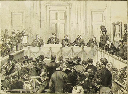 Le Monde Illustré n°1341 09/12/1882 croquis d'époque représentant une audience au tribunal dans le cadre de l'affaire Peltzer